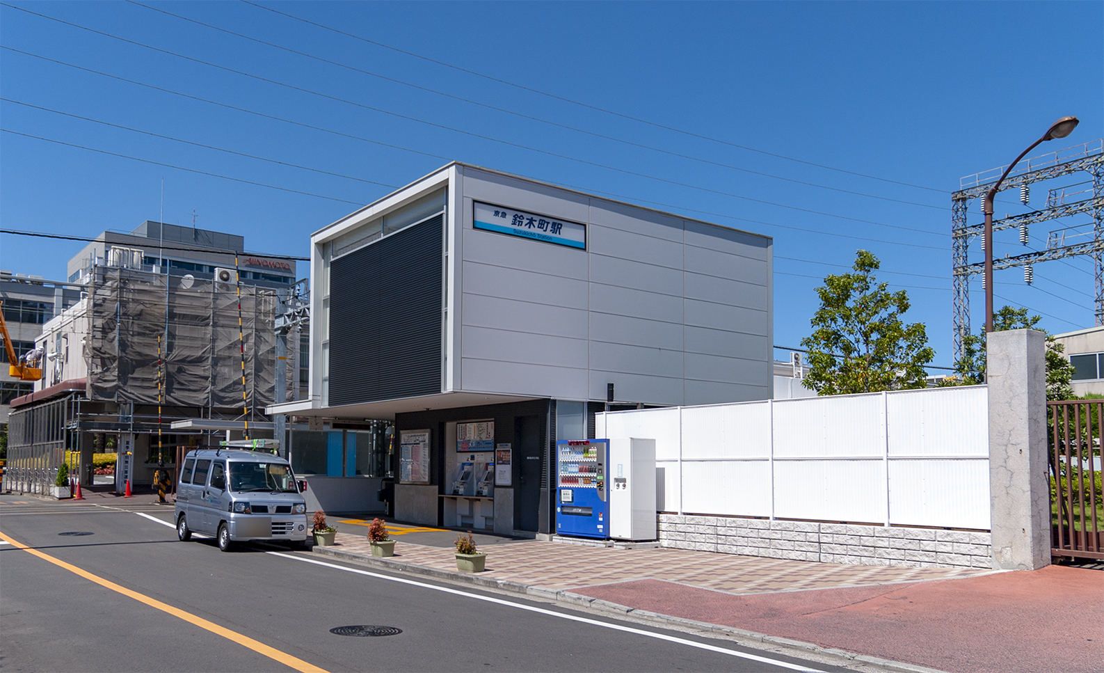 京浜急行電鉄株式会社大師線鈴木町駅全景